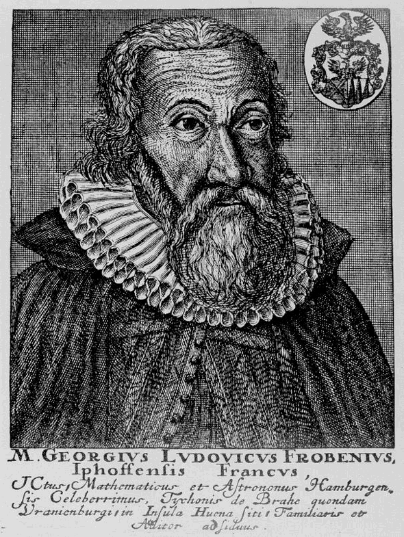 Zeitgenössisches Porträt (Stich) von Georg Ludwig Frobenius (1566–1645)